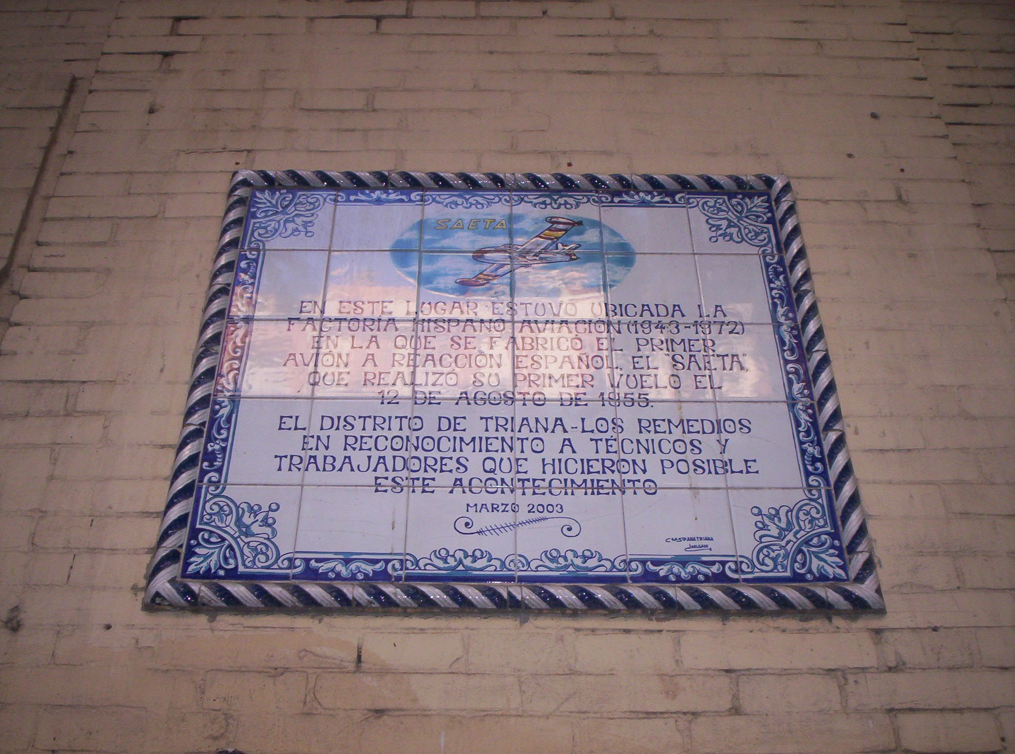 Foto del azulejo indicativo del edificio que albergó la fábrica de la Hispano Aviación en Triana, del cual sólo queda la parte de la fachada en la cual se encuentra alojado el mismo.